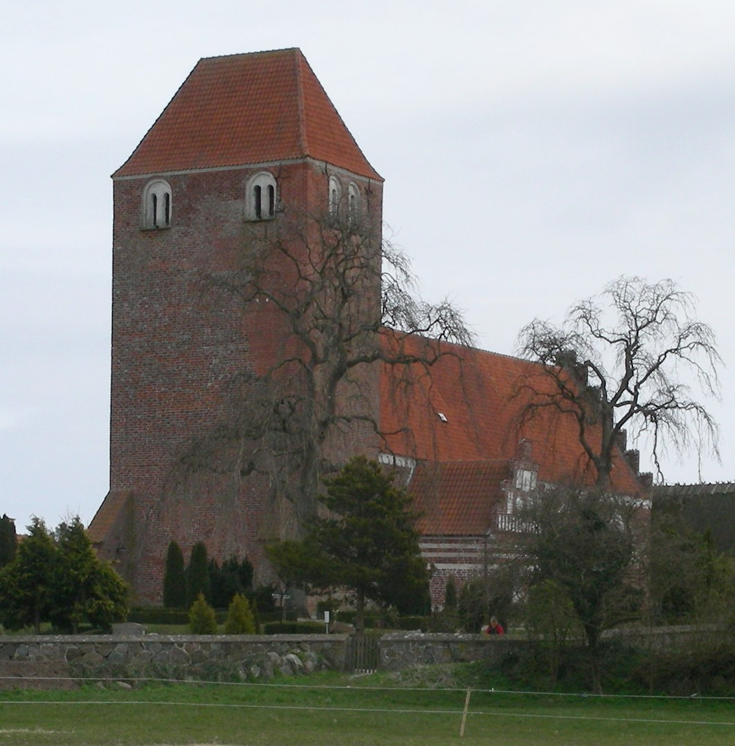 Magleby Kirke, Magleby, Møn, Denmark